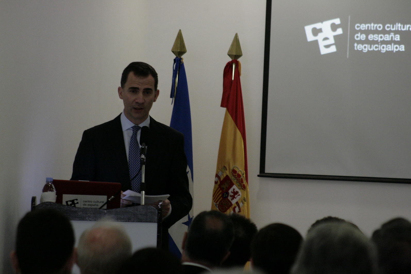 SAR el Príncipe de Asturias durante la presentación en el Centro Cultural de España en Tegucigalpa de la Biblioteca Virtual Centroamericana de la Biblioteca Virtual MIguel de Cervantes